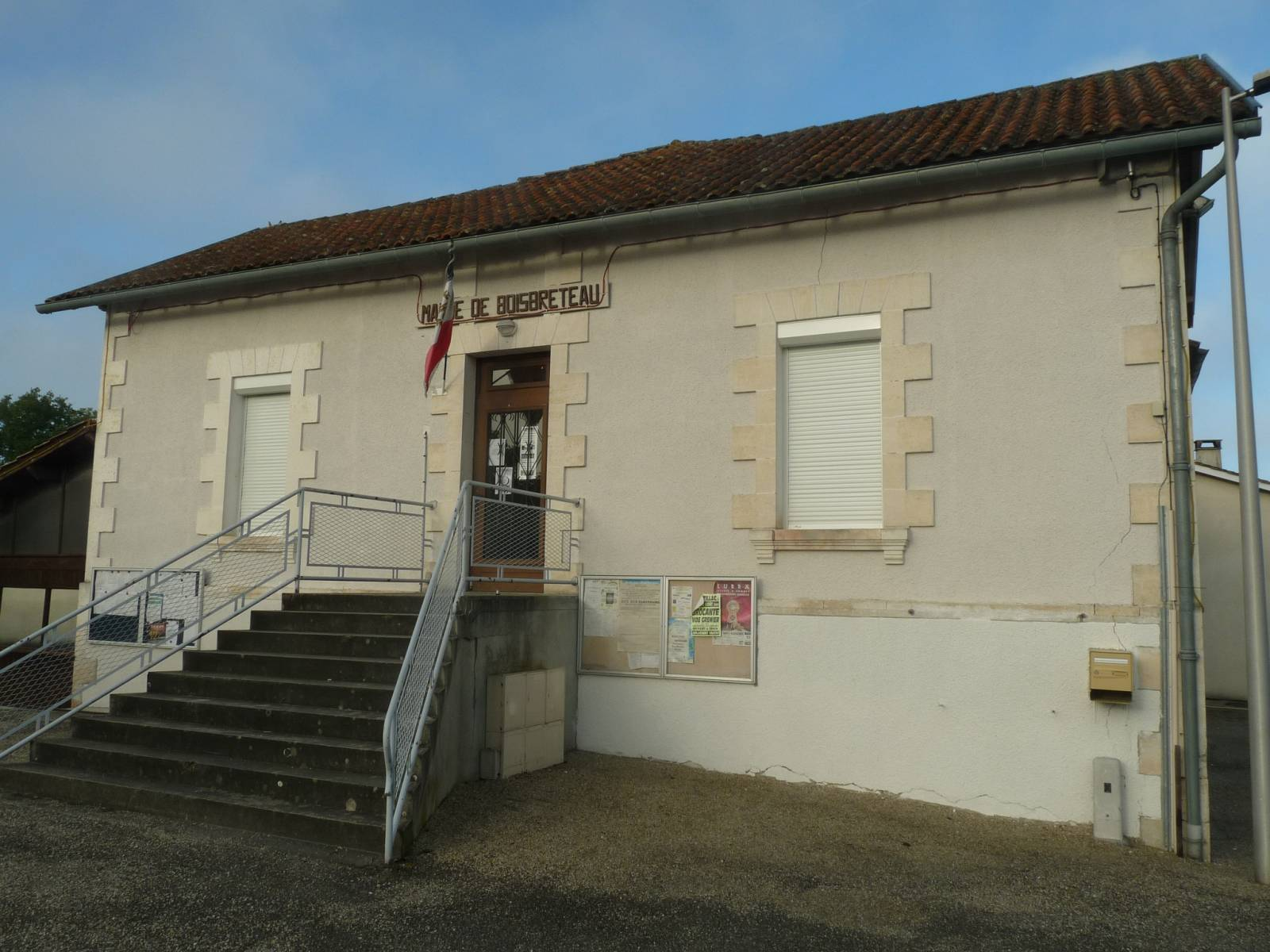 mairie de Boisbreteau (16), France